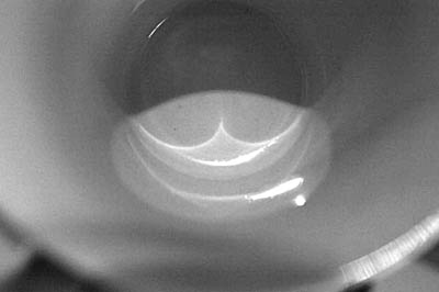 Caustique dans un liquide